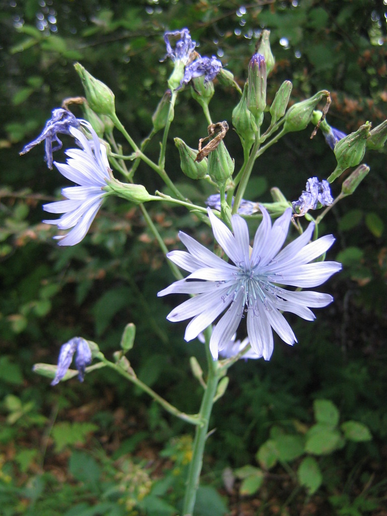 Laitue de plumier (Cicerbita plumieri). Monts d'Aubrac (France)